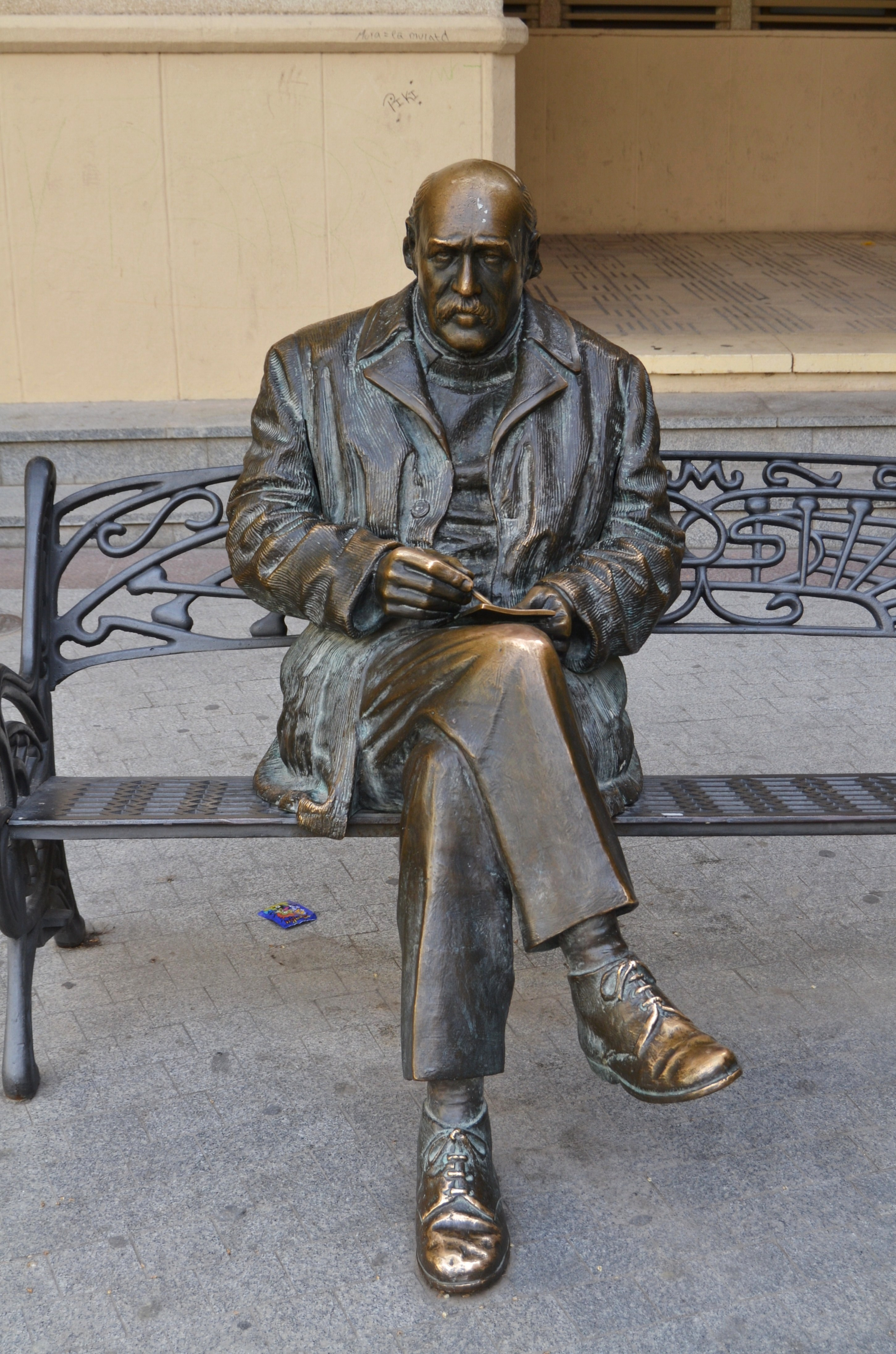 Estàtua de Sixto Marco a la plaça de sant Joan, Elx.